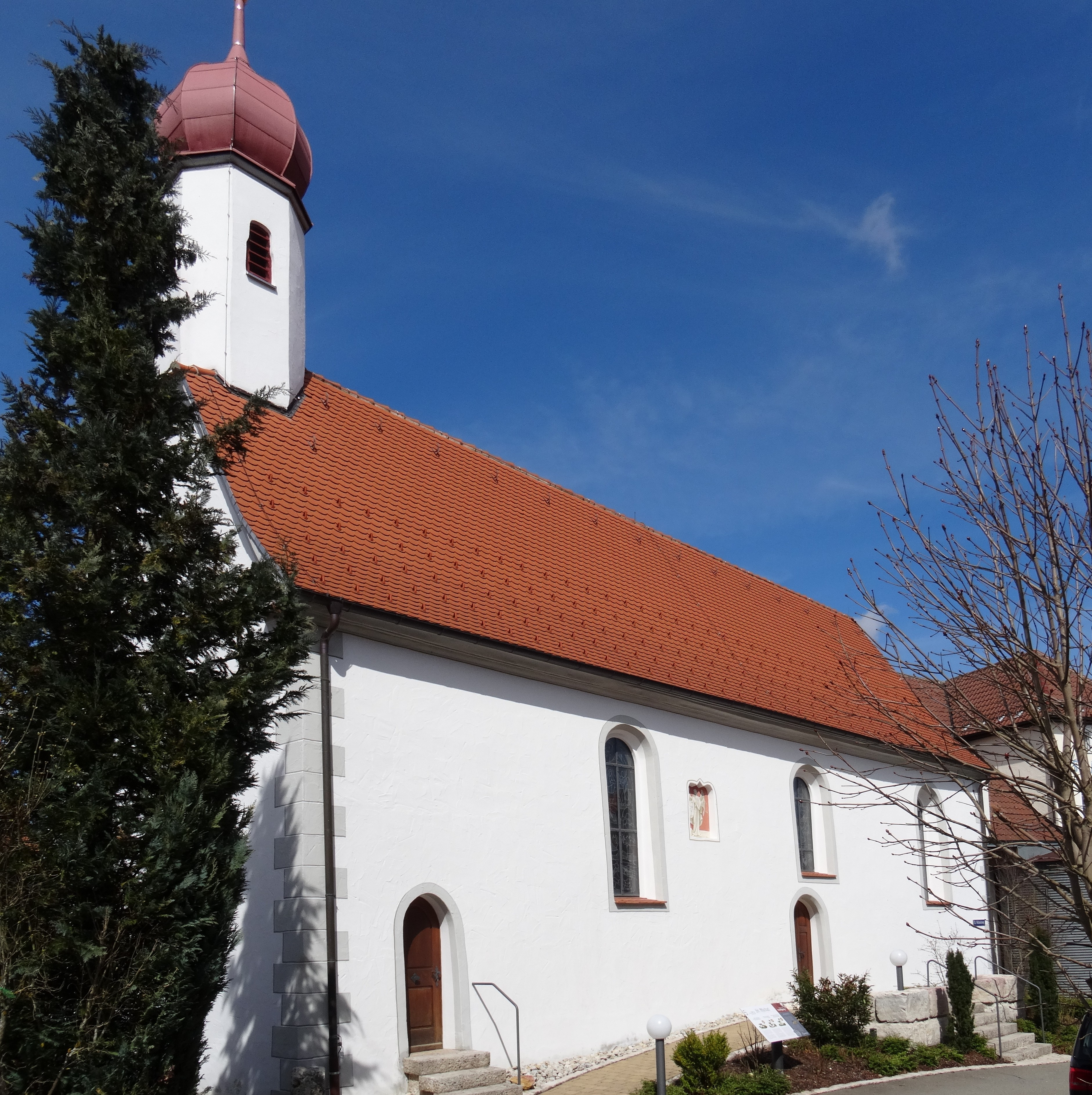 Michaelskapelle in Gammertingen. Historisch eine Kirche, heute Kapelle. [1]